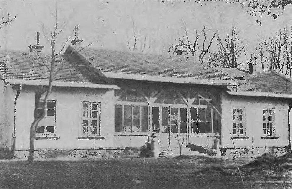 Budynek 10 pułku artylerii ciężkiej (-1933)